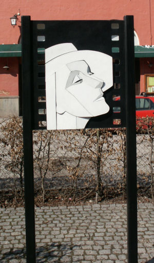 Greta Garbo Memorial by Tomas Qvarsebo at Greta Garbos Torg, Stockholm, Sweden.